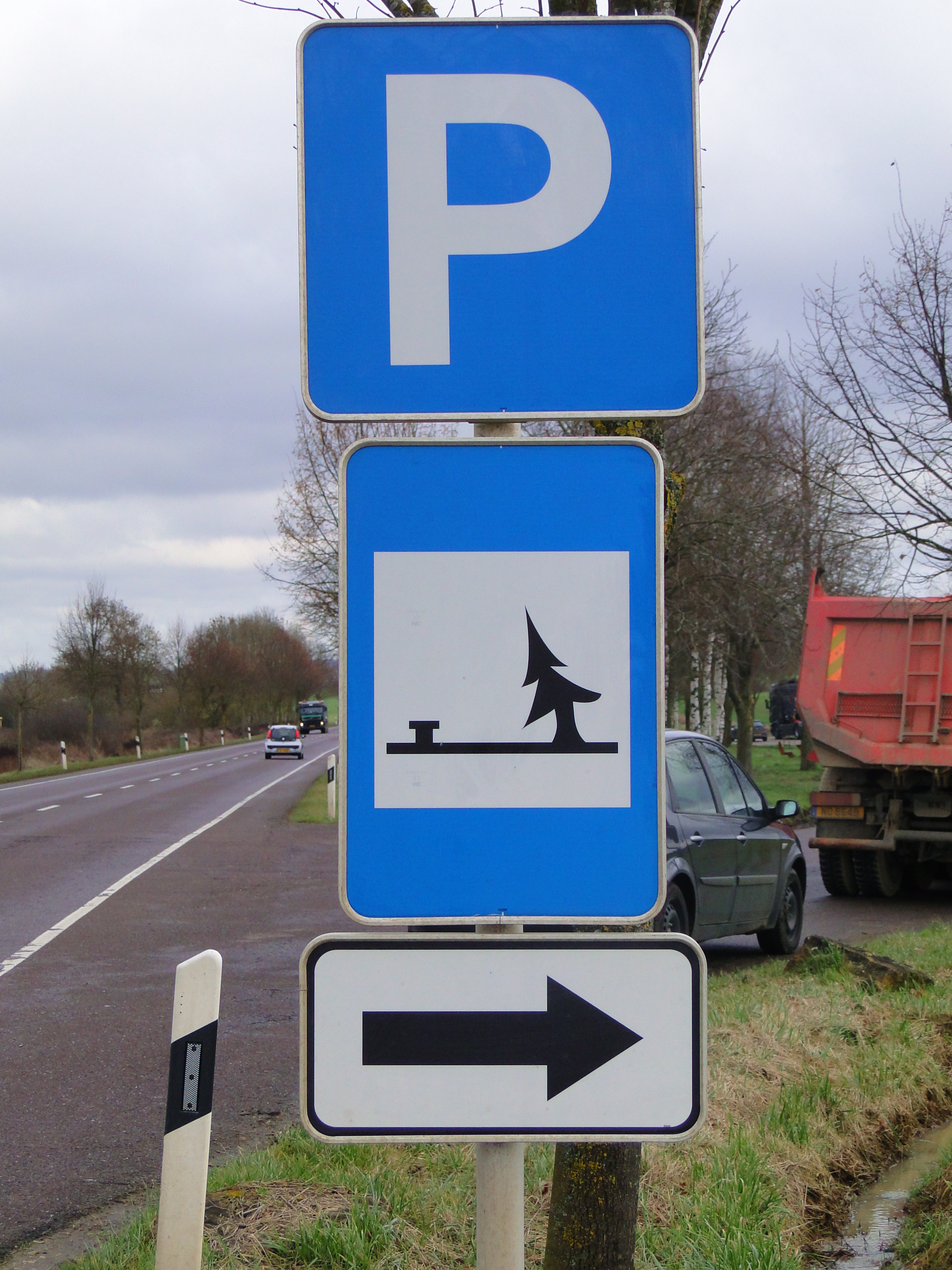 Schëlter E,23 "Parking" an F,8 "Emplacement de pique-nique" aus dem lëtzebuerger Code de la Route